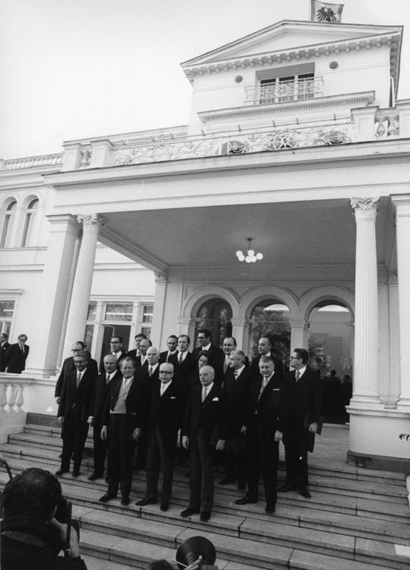 Bonn, den 15.12.1972 Bundespräsident Dr. Dr. G. Heinemann stellt sich mit dem neuen Kabinett Brandt auf der Freitreppe der Villa Hammerschmidt den Fotografen.